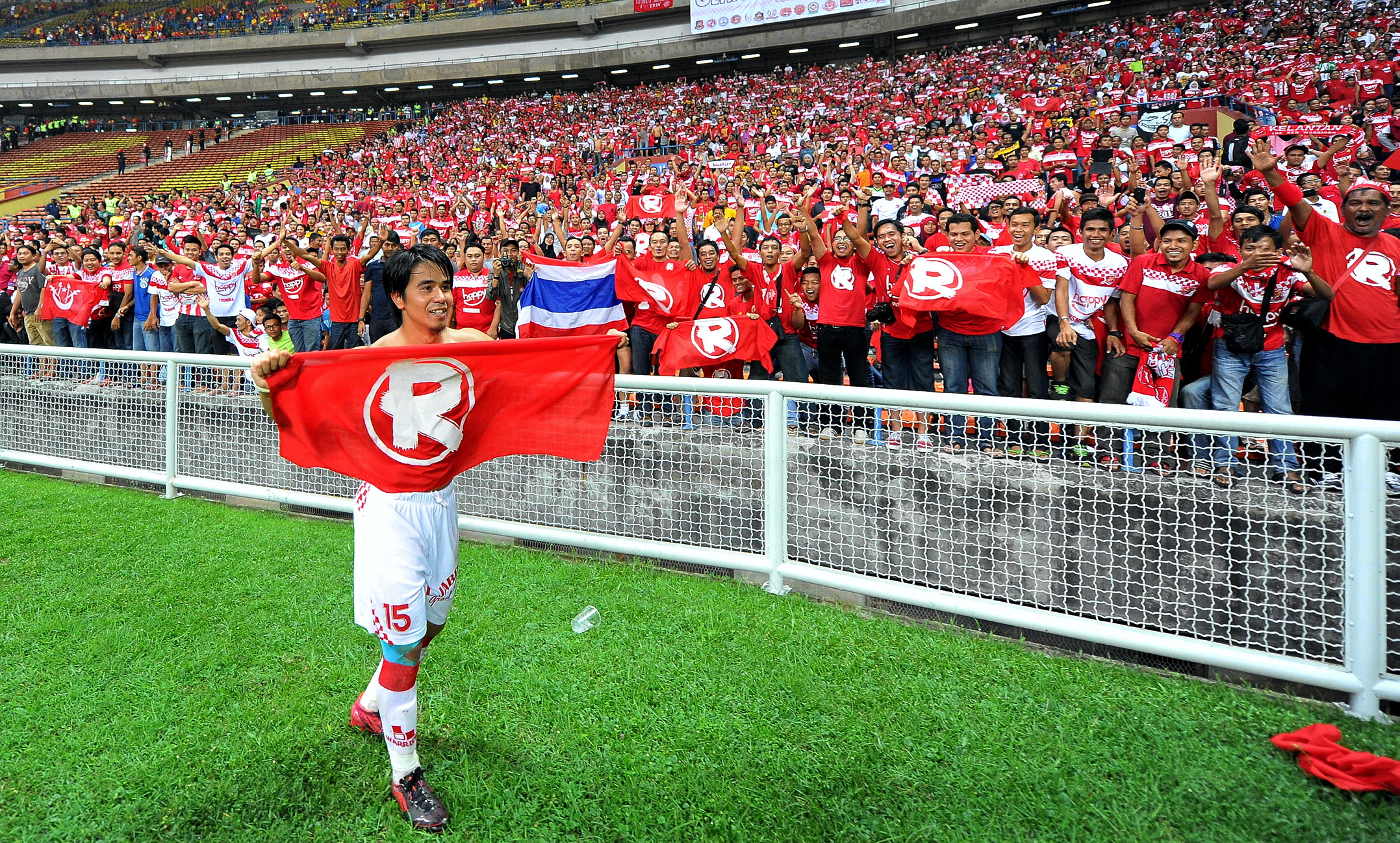 Famirul Asyraf Sayuti - Malaysia Cup 2012 semi-finals Kelantan VS Selangor